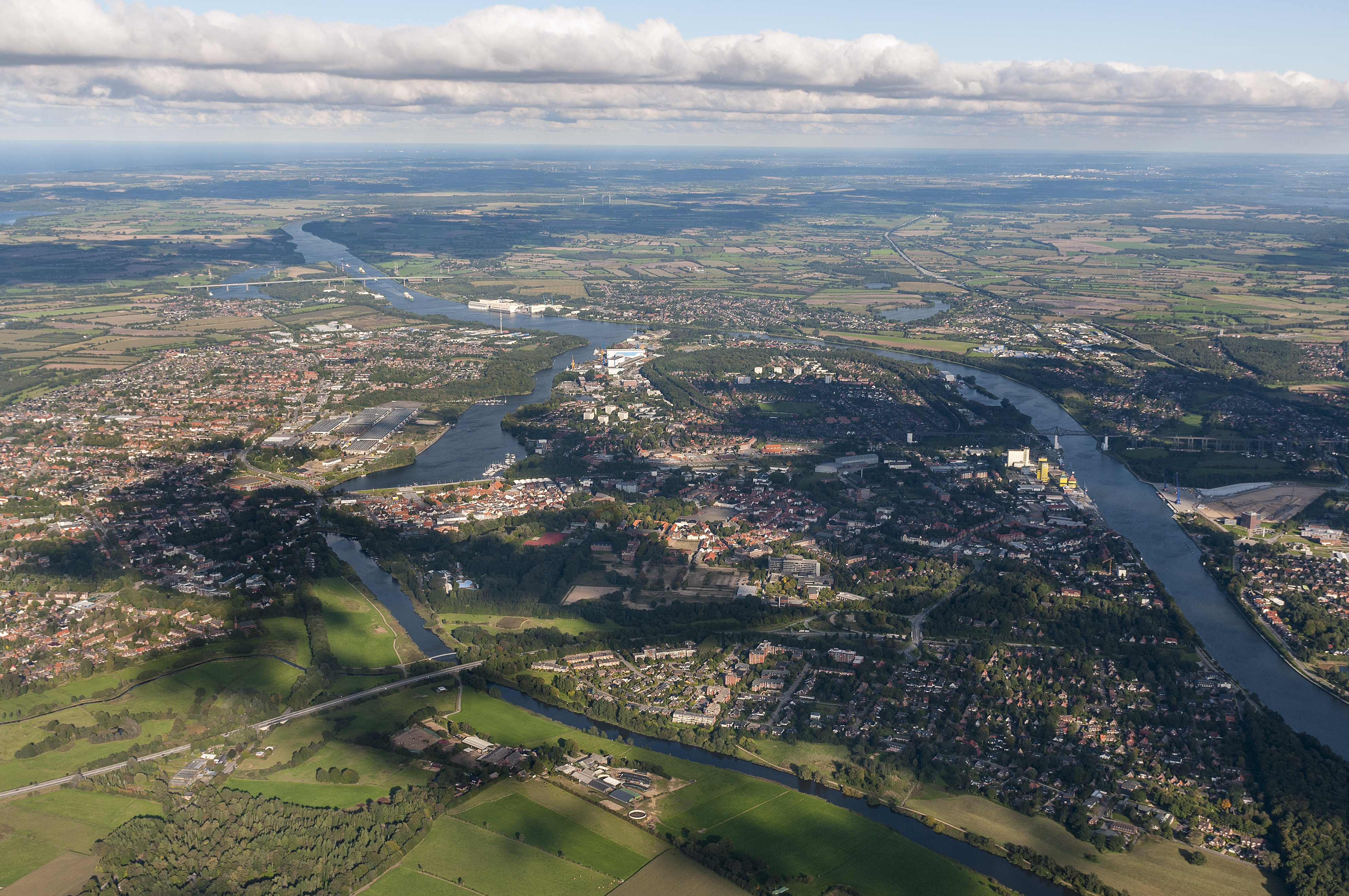 Fotoflug über das nordfriesische Wattenmeer, Blick aus W, 1 km Höhe auf Rendsburg